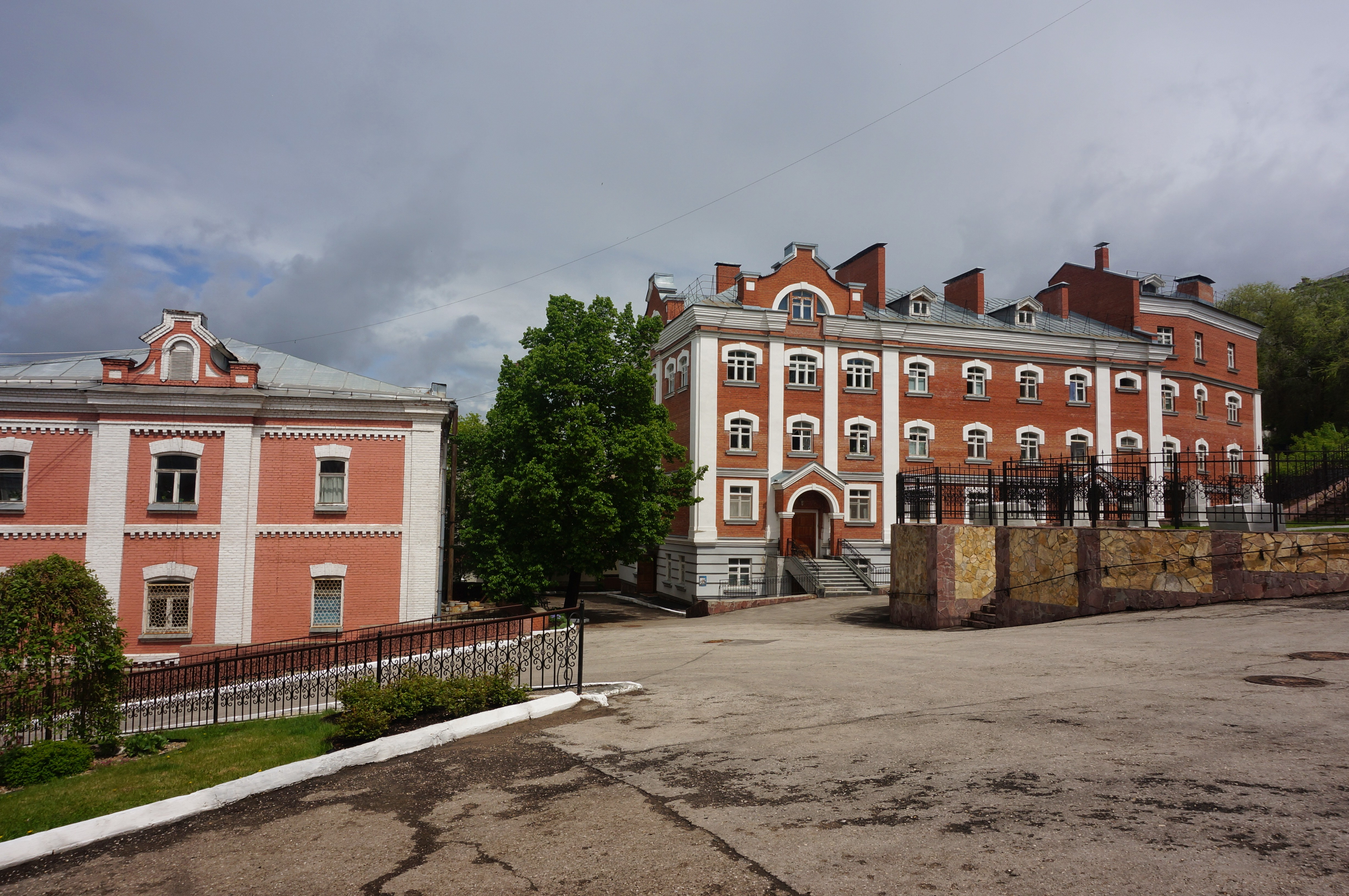 Иверский женский монастырь, Самара, Россия